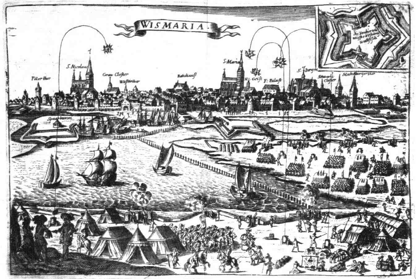 Detail from Image:1 620793W 001.jpg